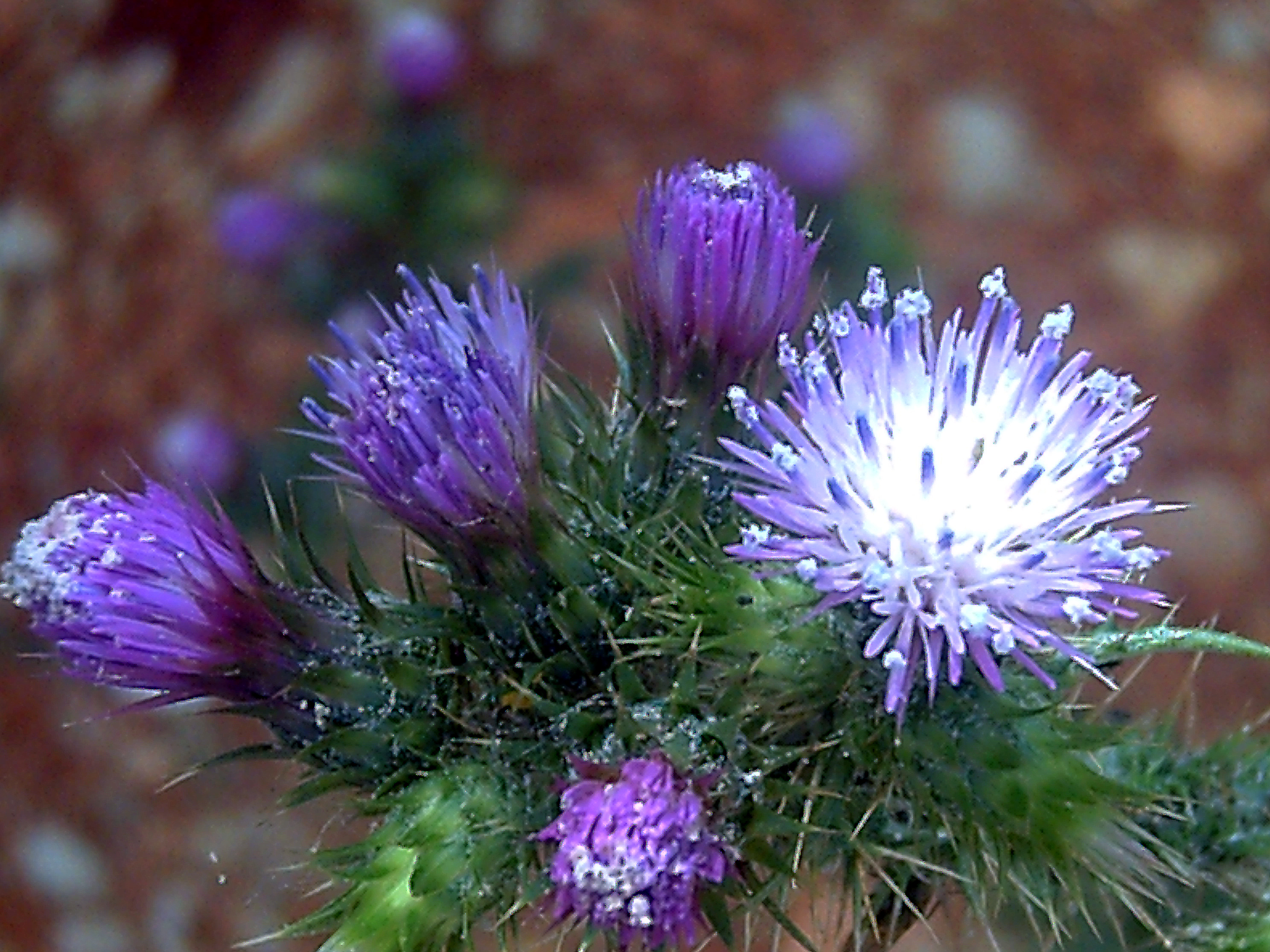 Carduus tenuiflorus Inflorescence Close up Dehesa Boyal de Puertollano, Spain